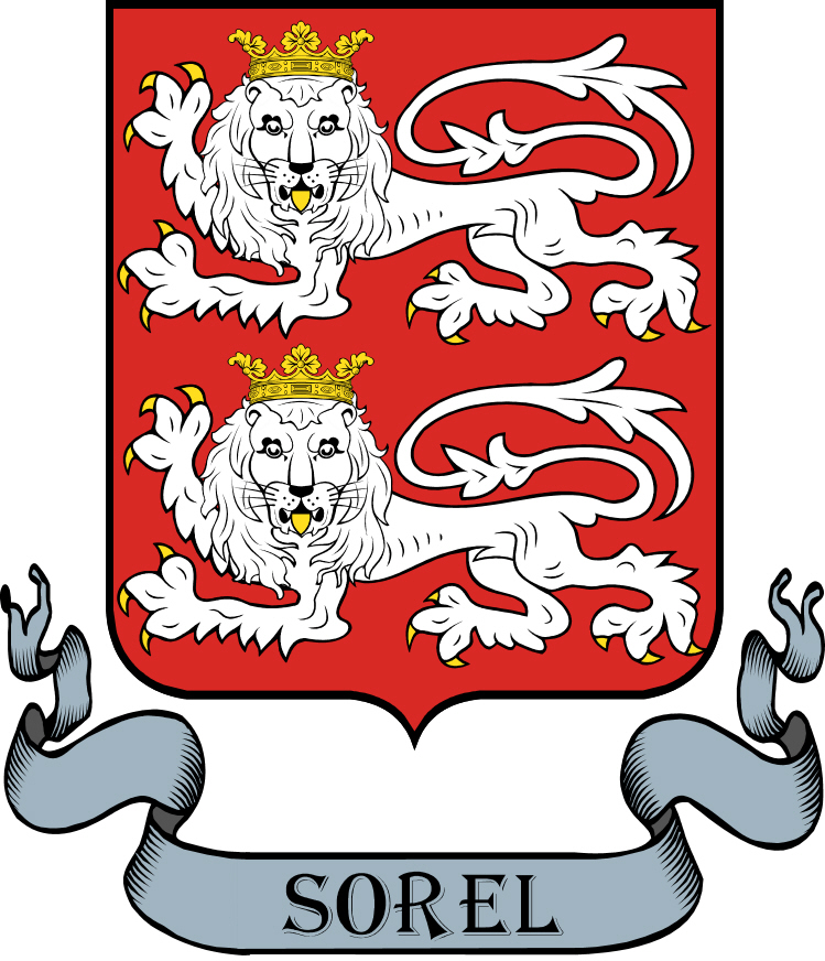 Blason de Sorel Le Grand CP 80240 INSEE 80737